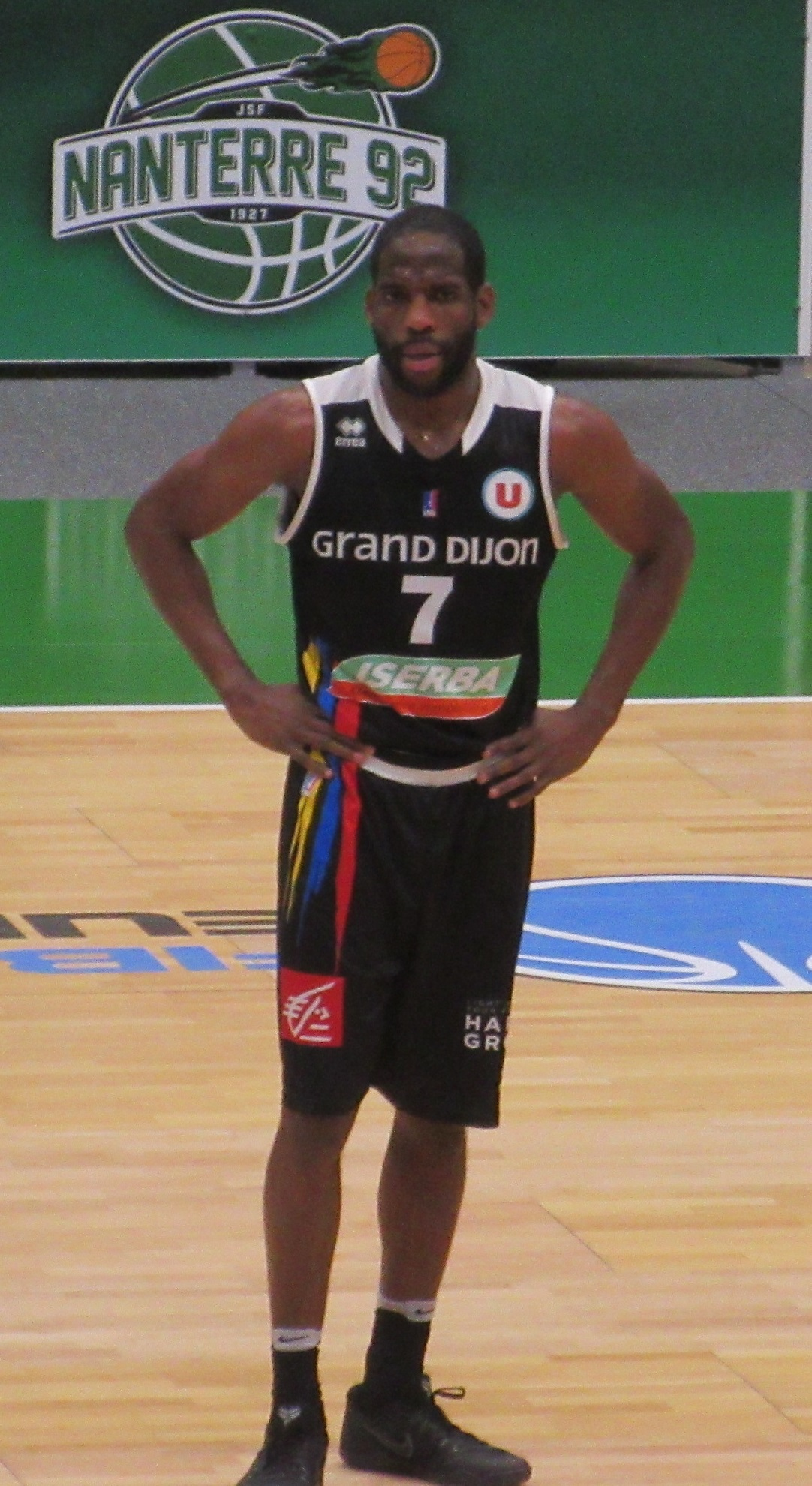 Ryan Brooks avec le maillot de Dijon